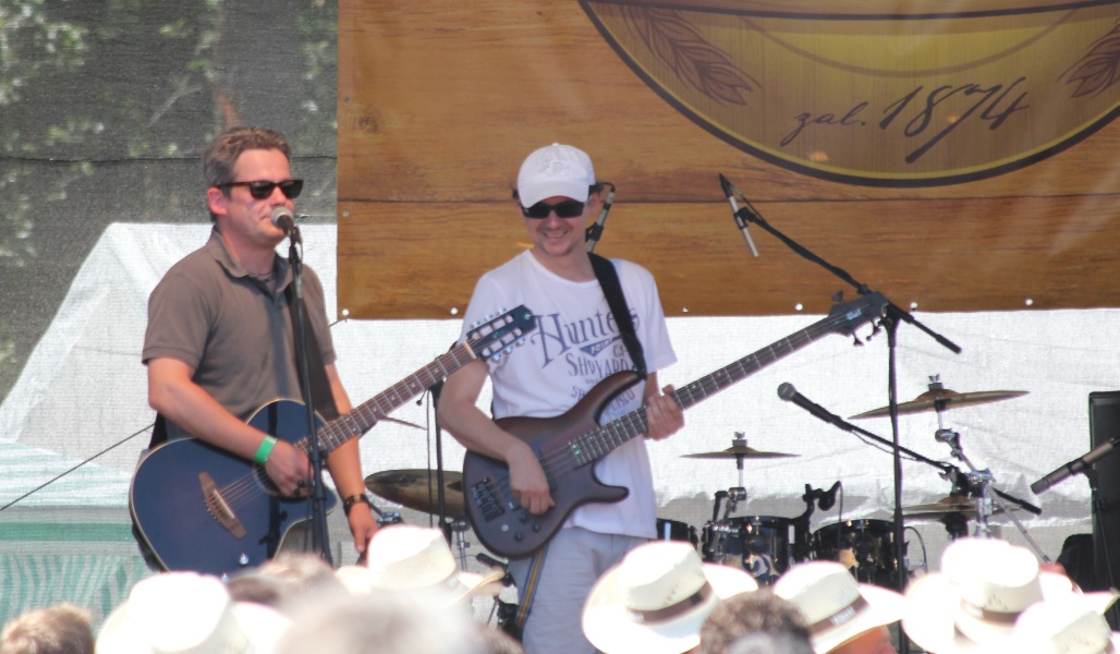 Aleš Háma a Jakub Wehrenberg, členové hudebního uskupení Hamleti hrají na Dni Kozla 2012.